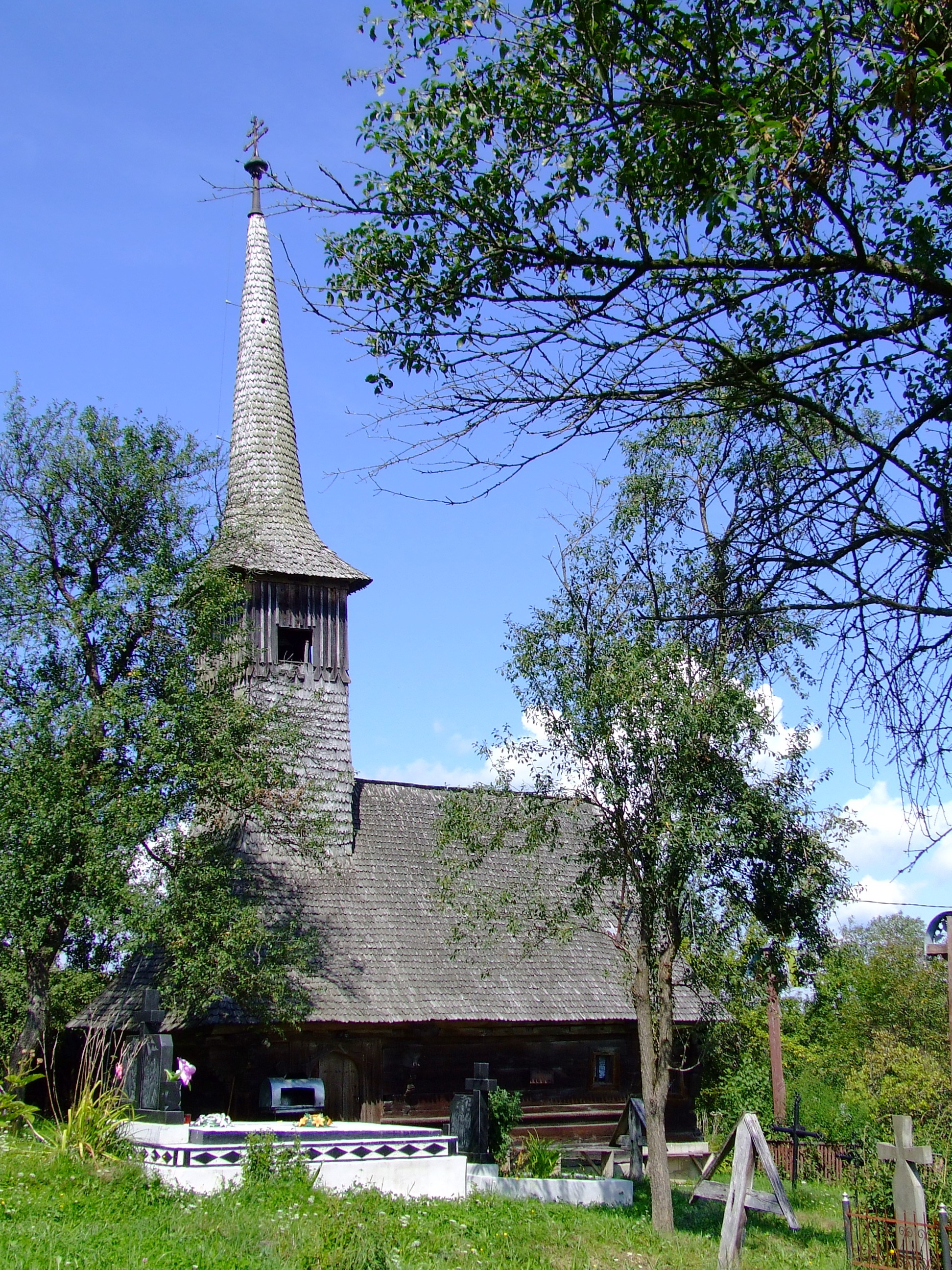 Biserica de lemn din Şoimuşeni, Sălaj. Autor: Bogdan Ilieş Data: august 2006